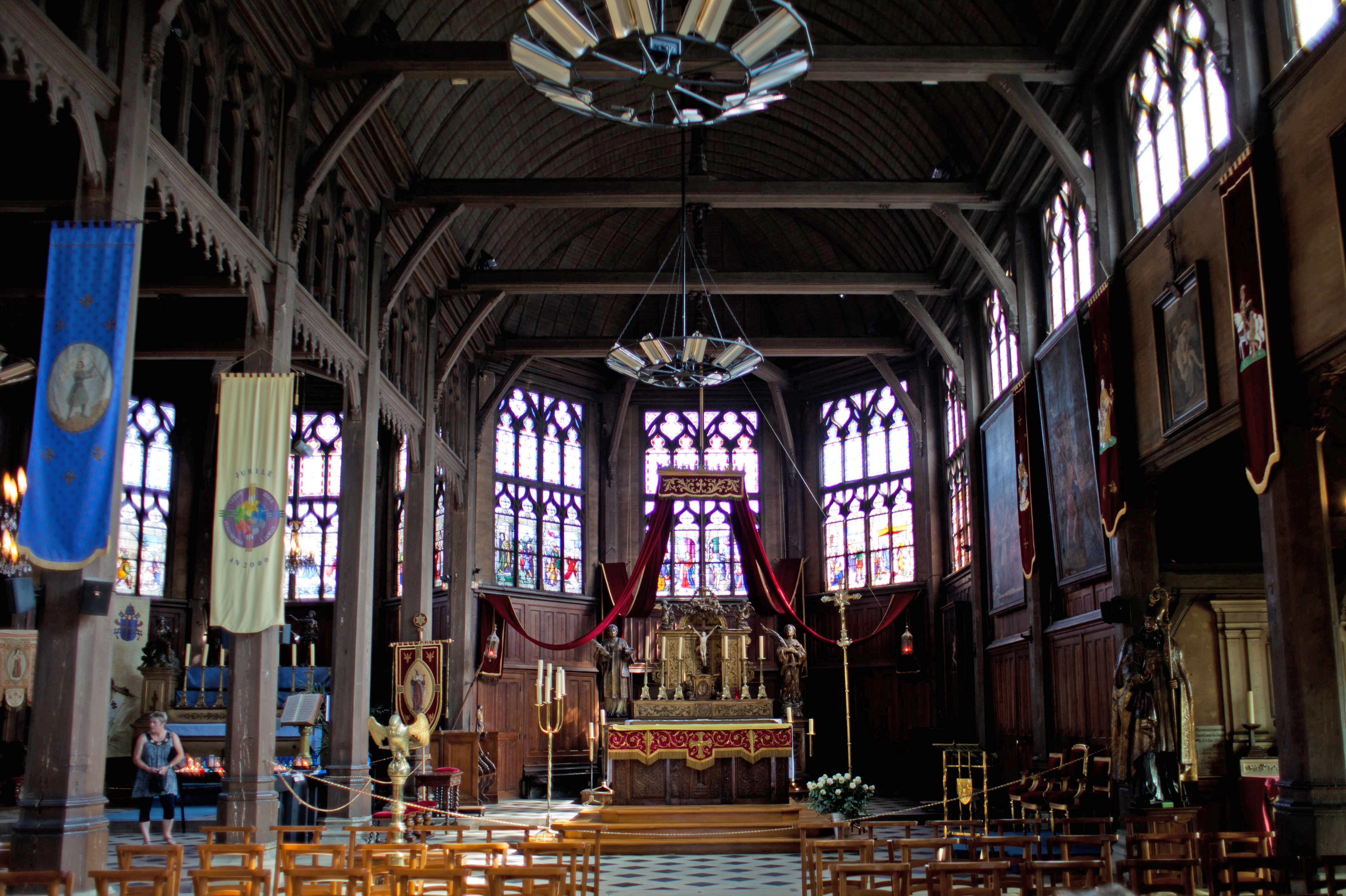 nef et coeur du XVIe siècle, Eglise Sainte Catherine, Honfleur .